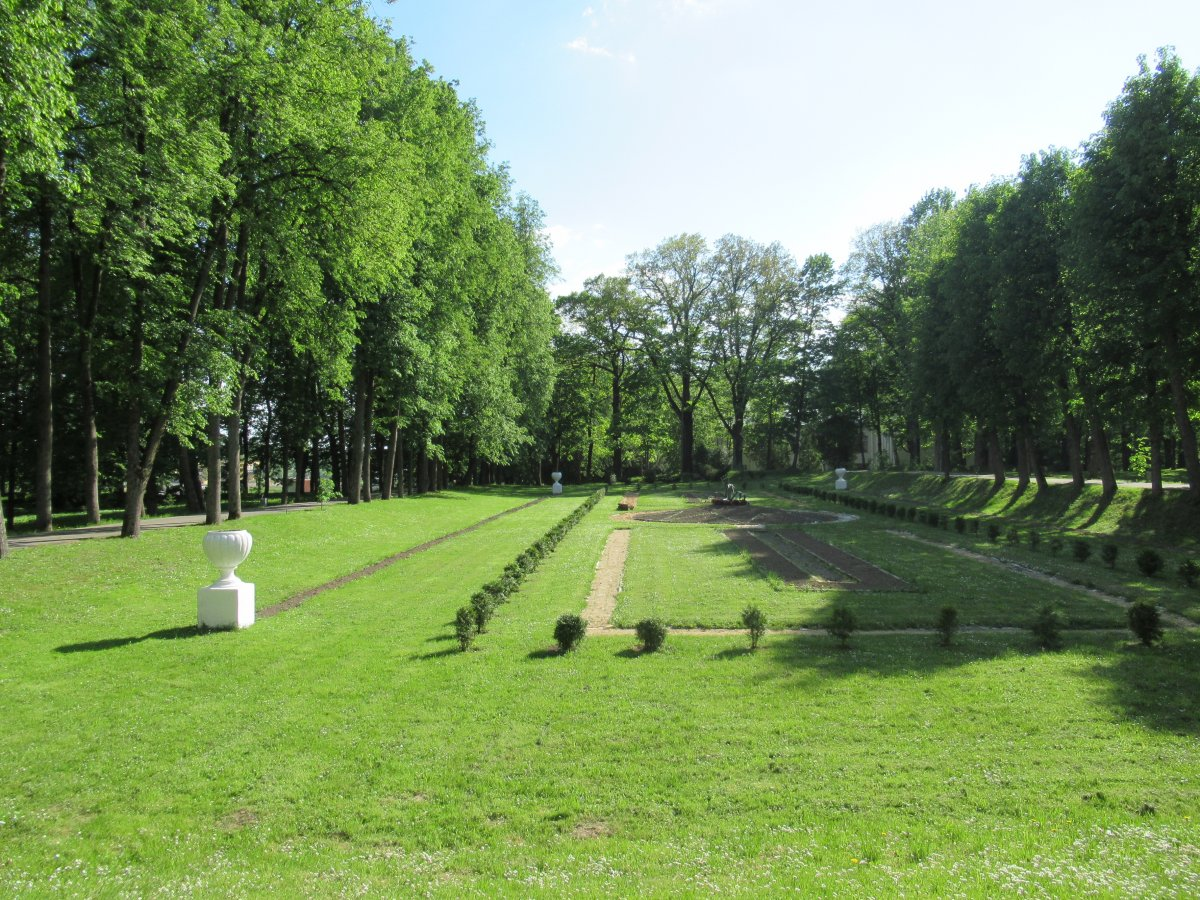 Горкі. Краявіды